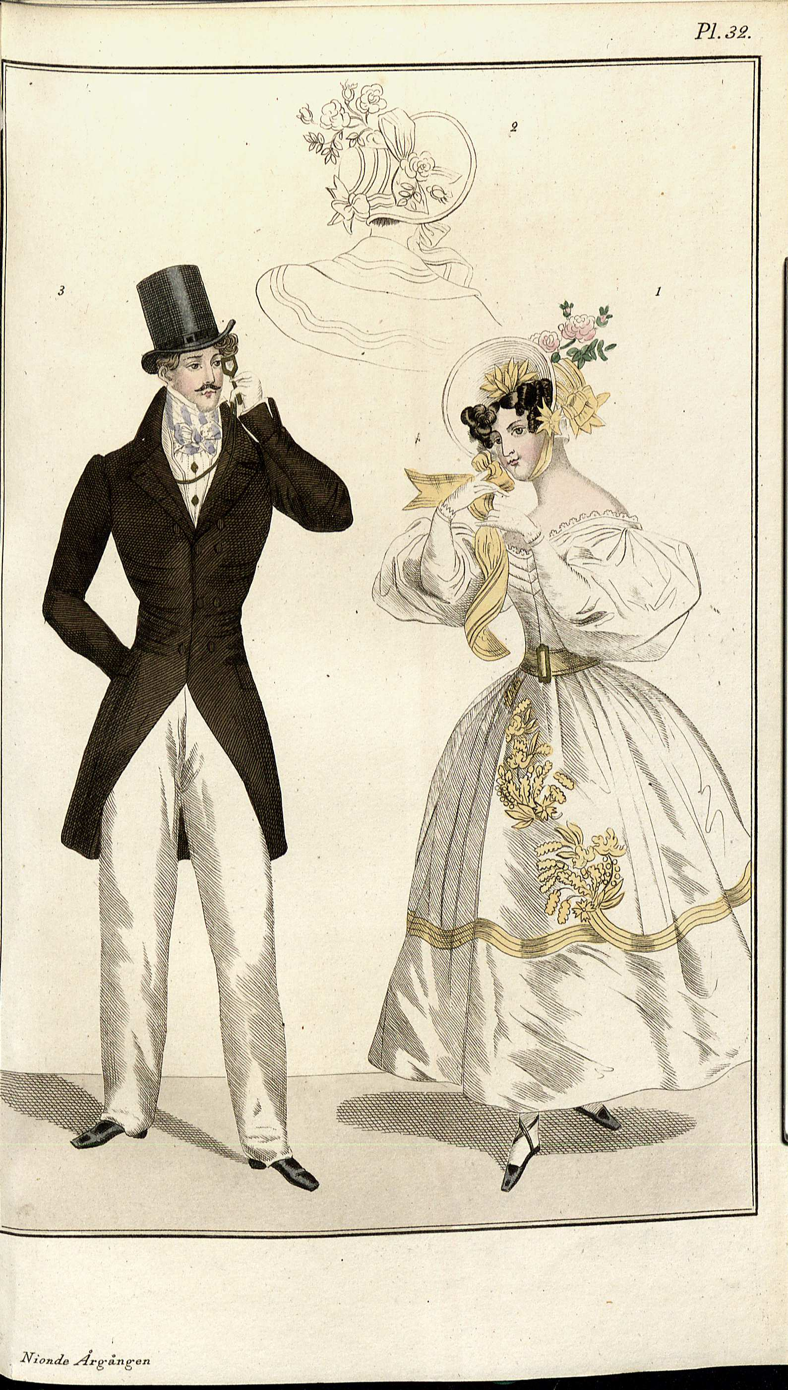 Wienmode; Hatt; Band; Klänning; Rock; Pantalonger; Väst; Halsduk